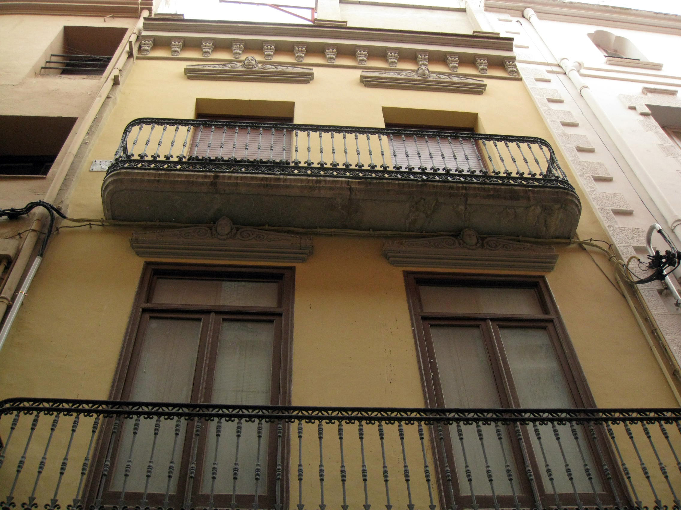 Casa al carrer Joan Maragall, 4 (Figueres)